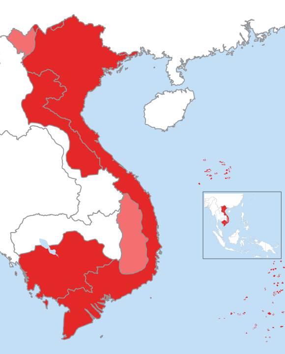 Quốc thổ An Nam dưới triều Minh Mệnh 明命, bao gồm cả các trấn ở Lào. Vùng thuộc phần đất Campuchia ngày nay là lãnh thổ Trấn Tây Thành 鎮西城 mà nhà Nguyễn chiếm được trong 6 năm (1835-1841) trước khi bị đánh đuổi. Bản đồ bao gồm cả các các vùng đất bị cắt cho nhà Thanh năm 1887 theo công ước Pháp-Thanh, vẽ đè lên biên giới ngày nay. Lãnh thổ được cai trị trực tiếp từ Huế Các vùng đất phiên thuộc Đại Nam, bao gồm Nam Bàn và 12 xứ Thái